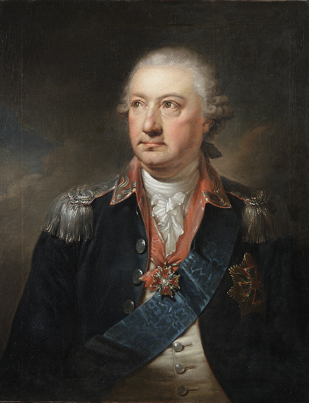 Stanisław Kostka Gadomski herbu Rola (1718-1797)